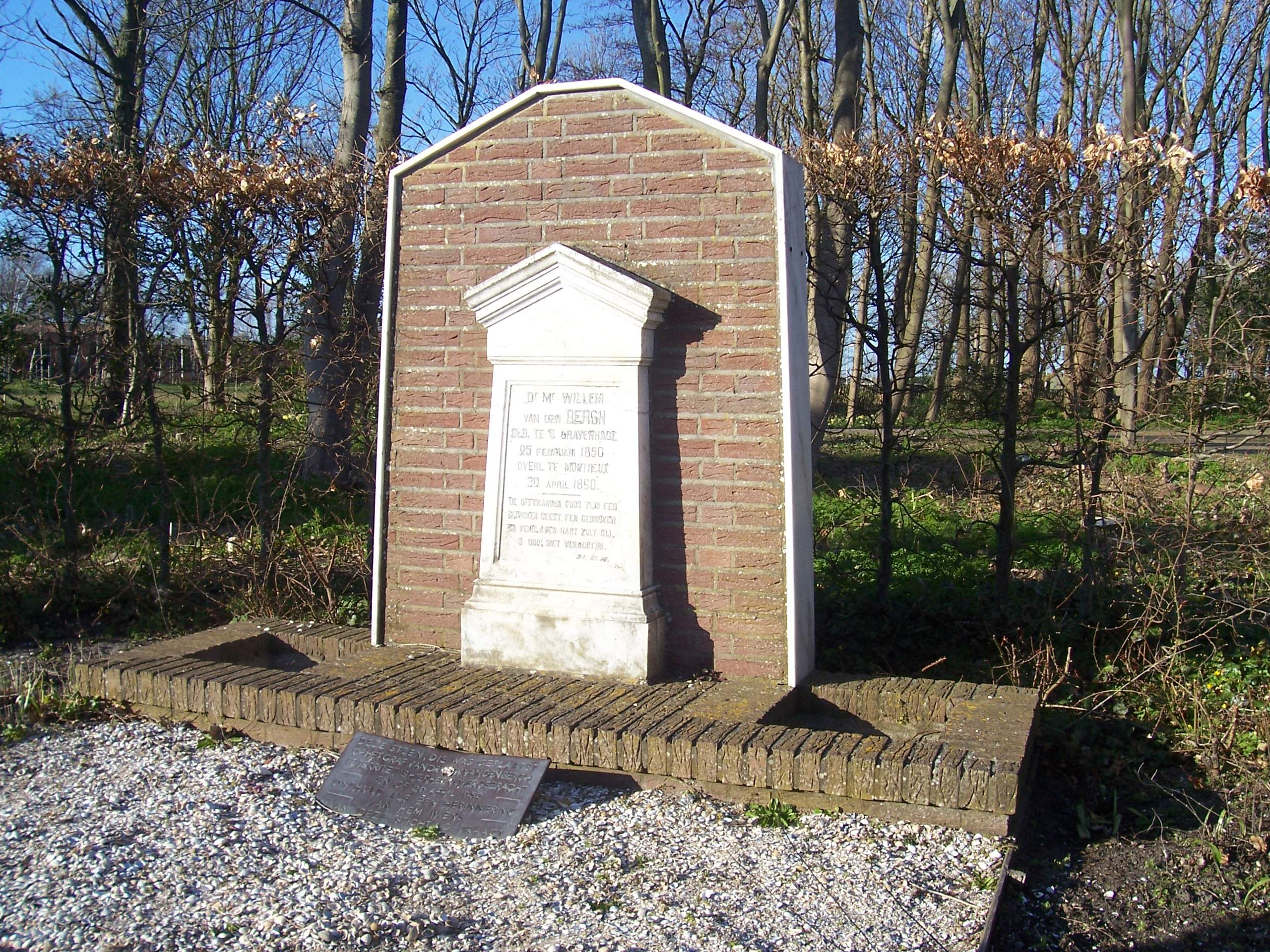 Grafmonument dr. mr. Willem van den Bergh. 1850-1890. Willem van den Bergh-stichting. 's Heeren Loo